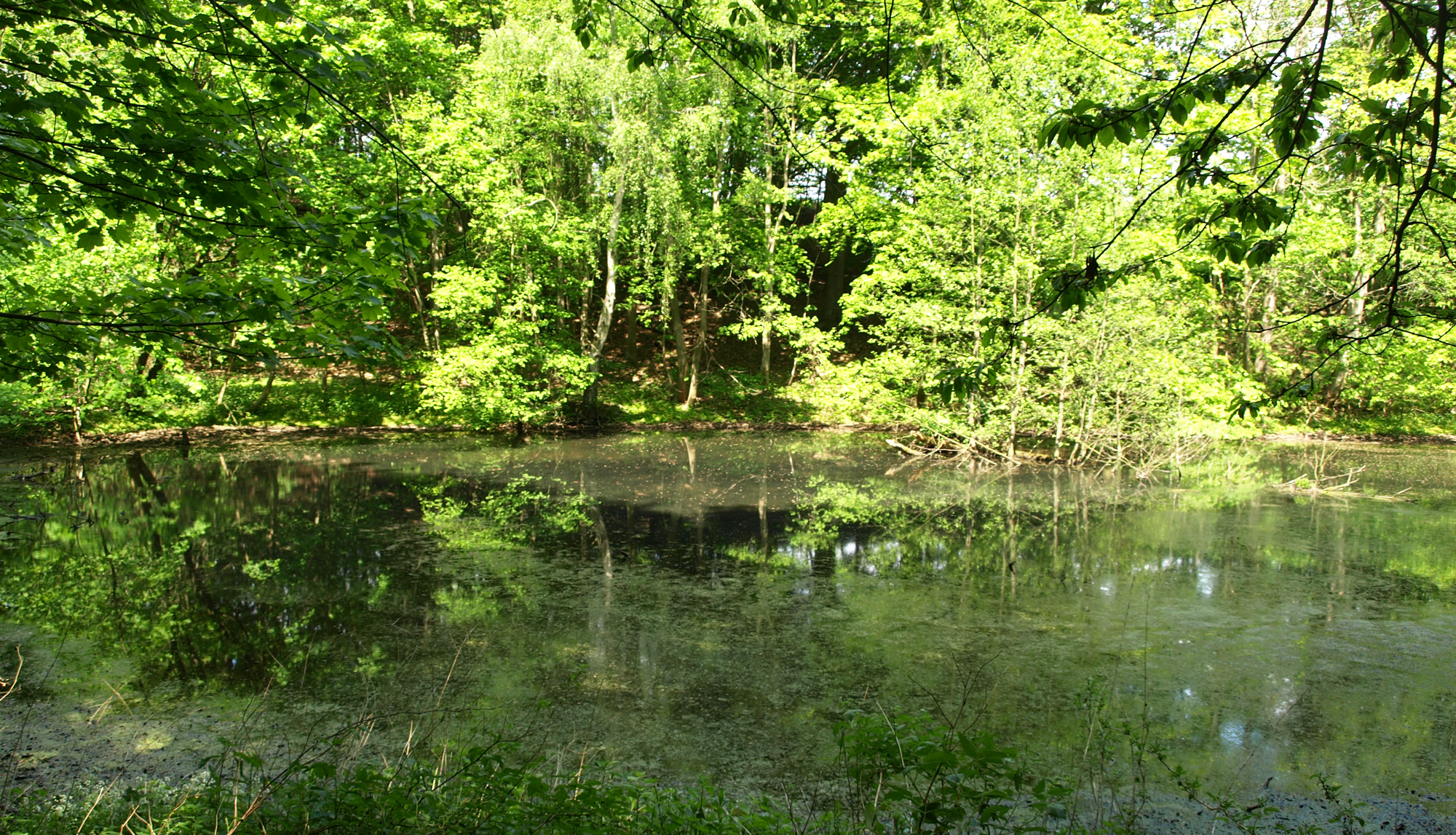 Koelbjergmandens fundsted i Grøftebjergmosen ved Koelbjerg på Fyn.